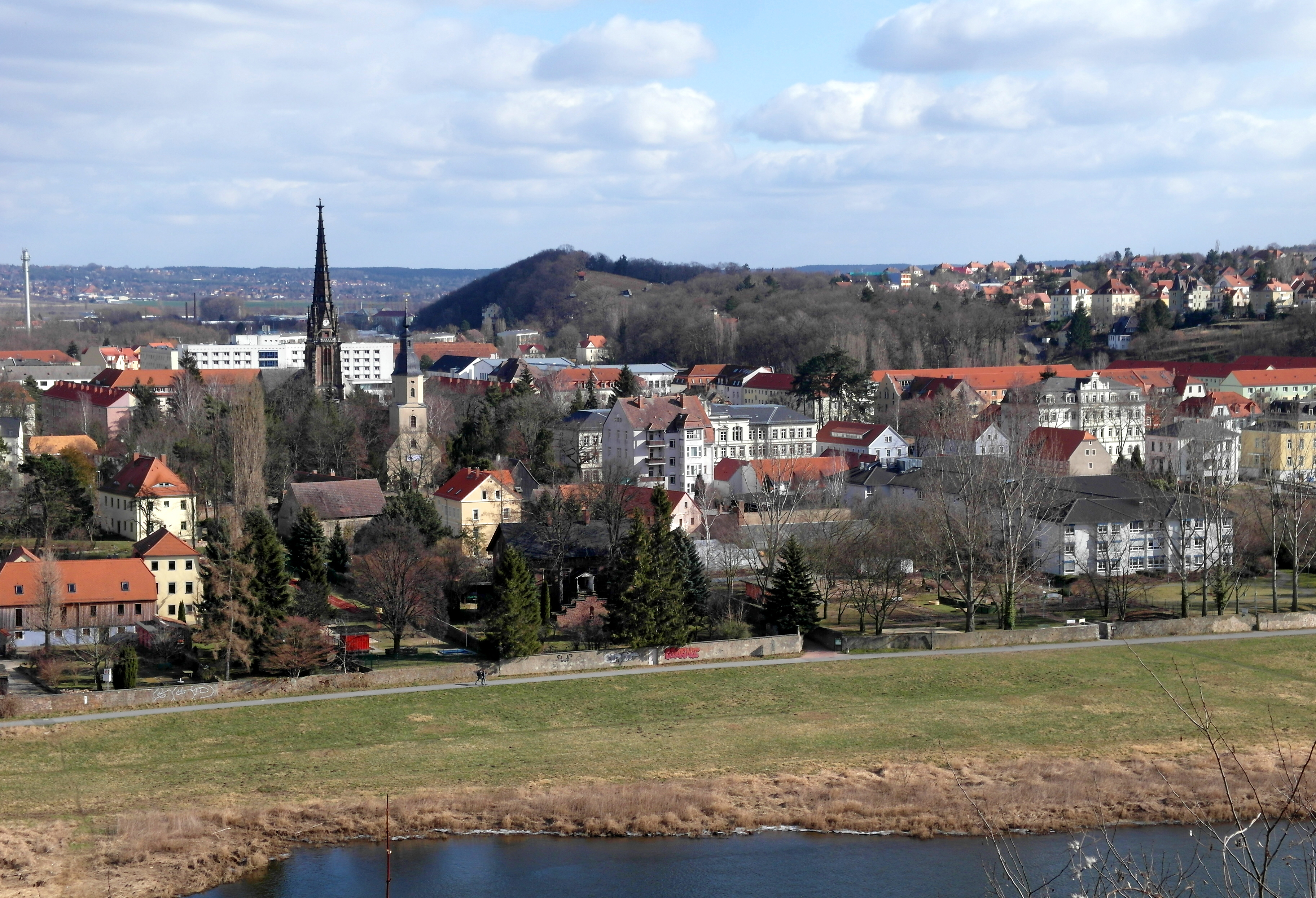 24.02.2018 01662 Meißen: Sicht von Westen über die Elbe zum Stadtteil Meißen-Cölln. Zu erkennen sind der neogotische Turm der Johanneskirche in der Johannesstraße (GMP: 51.159360,13.486434) und rechts davor die St. Urban Kirche (St. Urbanskirche) an der Dresdner Straße (GMP: 51.159252,13.484397). Im Hintergrund rechts die Höhen von Meißen-Zaschendorf. [SAM4319.JPG]20180224205DR.JPG(c)Blobelt